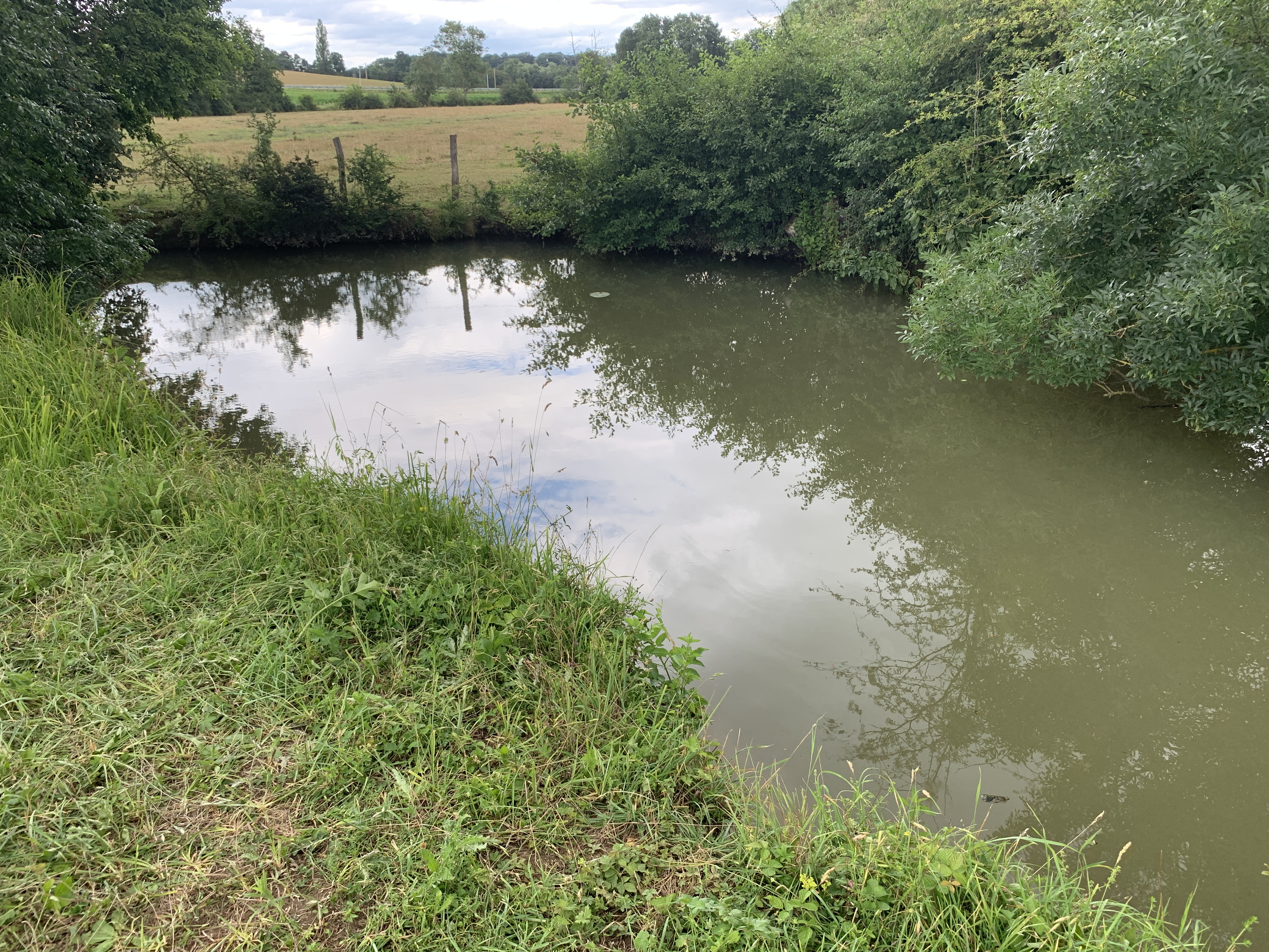 Bief de Cheval-Queue au lieu-dit Mare Moiroux, Saint-Cyr-sur-Menthon.